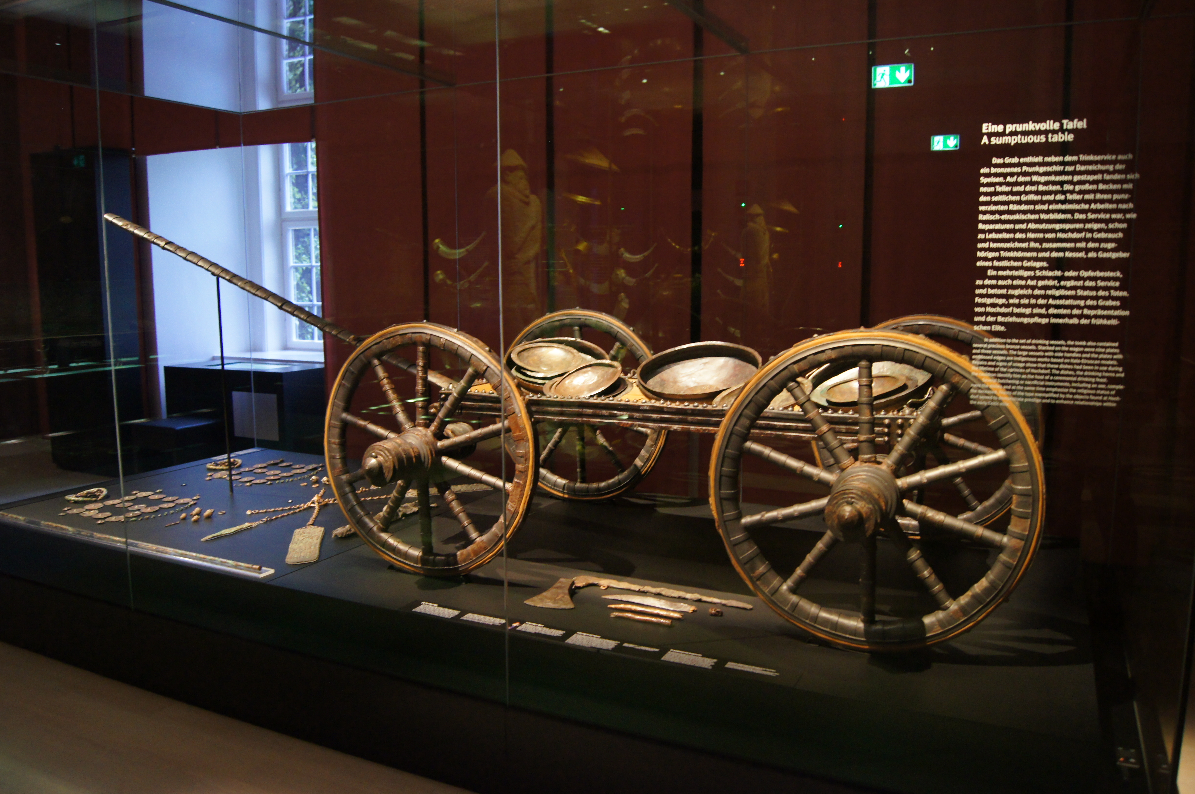 Exponate der Ausstellung zu den Prunkgräbern und Machtzentren der frühen Kelten im Landesmuseum Württemberg, Stuttgart